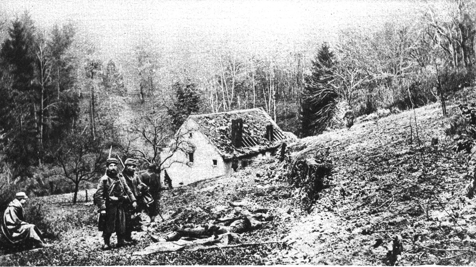 Vue du Bois-le-Prêtre dans l'hebdomadaire Le Miroir des combats de 8,9 et 10 décembre.